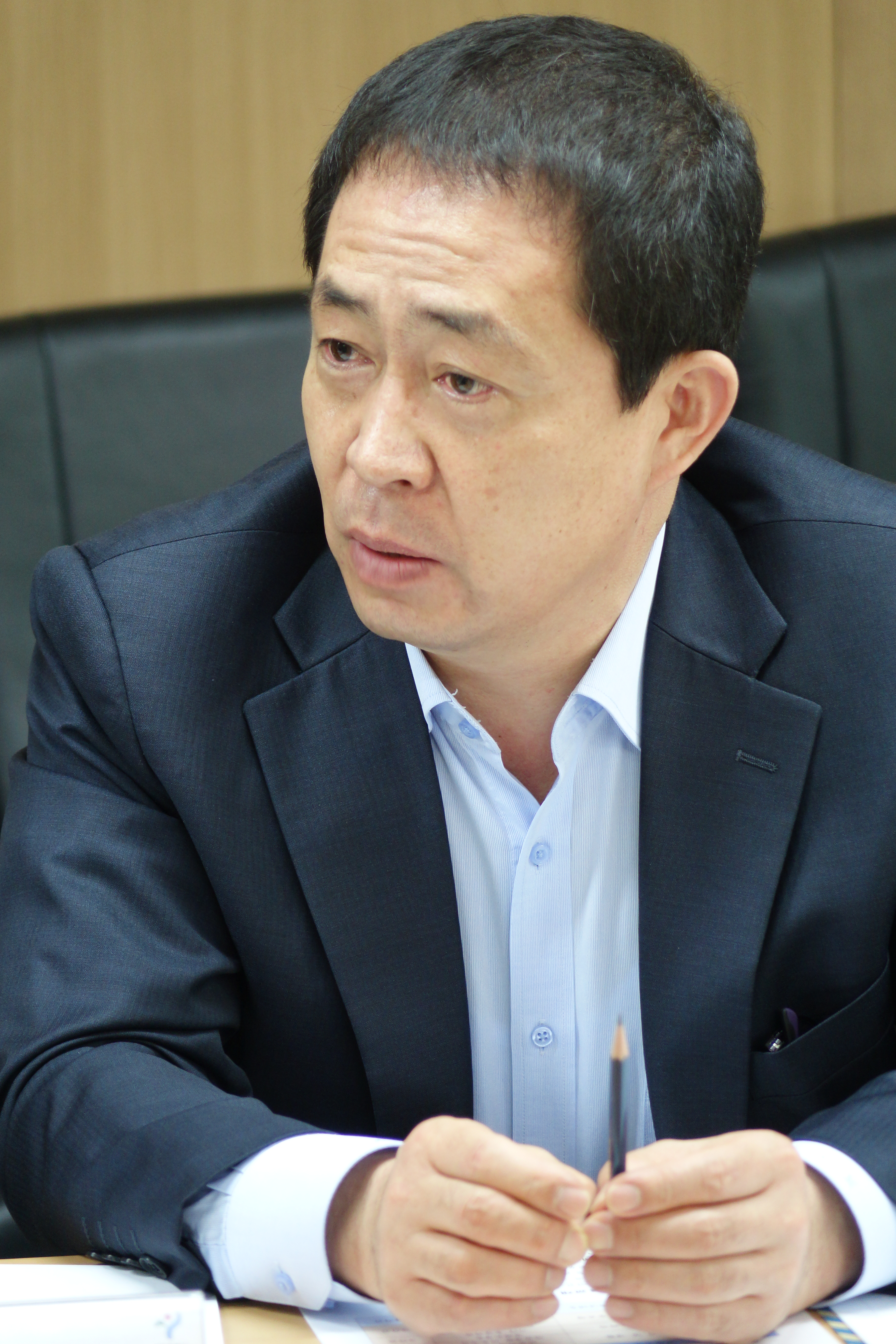 고석, 2015년 3월 서울특별시 중구 서울소방재난본부 시민안전파수꾼 자문위원 회의